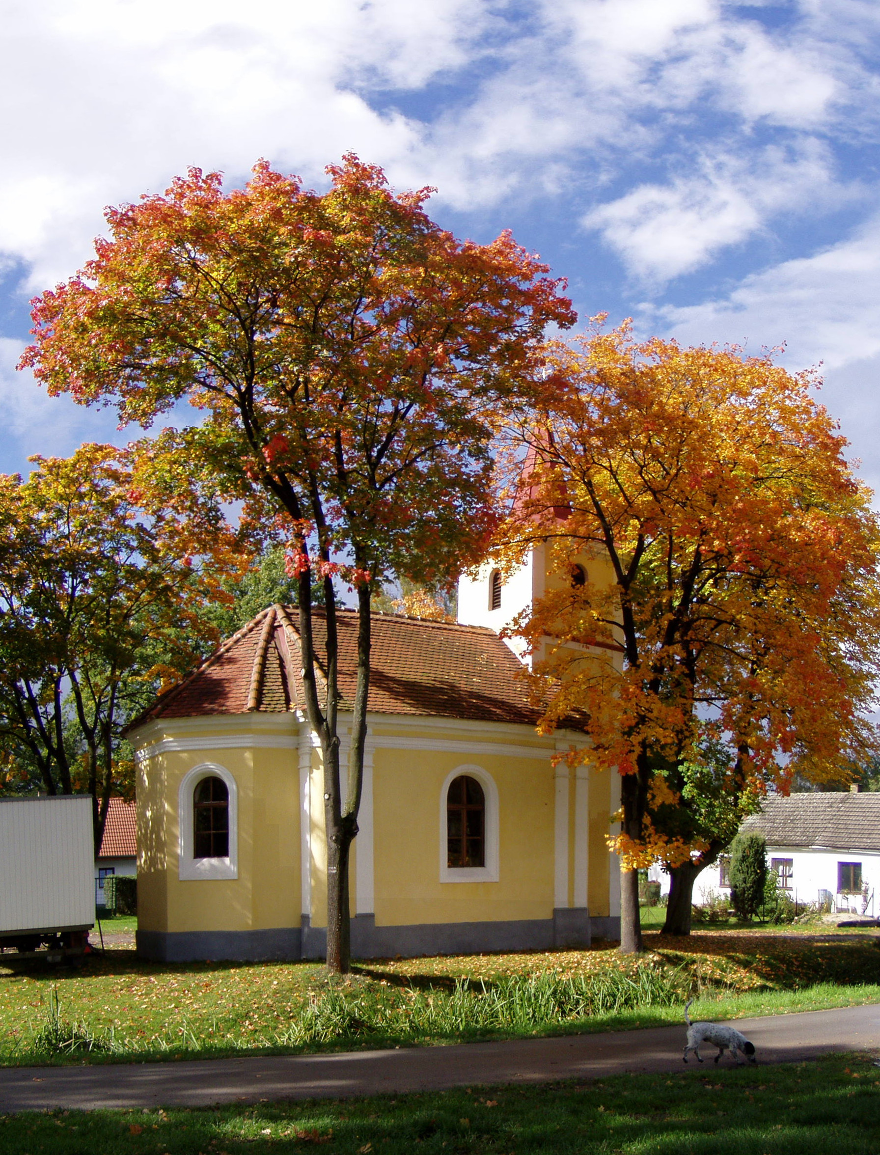 Česky: Kaplička ve Lhotě (Mladošovice)